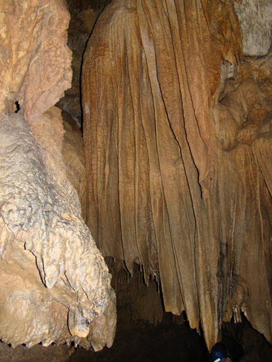 Cueva de la vaca, curtití Santander